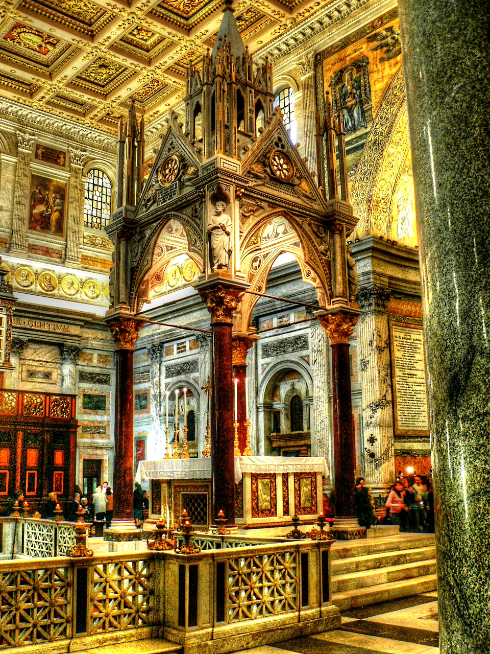 Bei der Basilika handelt es sich um eine der vier Papst Basiliken Roms. Sie gehört zum exterritorialen Besitz des Heiligen Stuhl und ist eine der sieben Pilgerkirchen Roms. Der erste Bau stammt von Kaiser Konstantin aus dem Jahre 324. In der Folgezeit wurde die Kirche, die über dem vermeintlichen Grab des Apostel Paulus stehen soll, ständig vergrößert und ausgebaut. Seit dem 7 Jhd befindet sich in Skt Paul eine Benediktinerabtei. Über den Säulen des Langschiffes befinden sich 265 Medaillons mit dem Konterfei aller Päpste. Zusätzliche Information: Der Anfang dieses Jahrtausend gefunden 2,4 m lange Sarkophag wurde mit einer endoskopischen Sonde untersucht. Man fand Stoffrest und menschliche Knochen aus dem ersten oder zweiten Jhd n. Chr. Bei dem Stoff habe er sich um purpurnes Leinen mit Goldauflage und blauen Fetzen gehandelt. Die Wahrscheinlichkeit, dass es sich wirklich um den 67 hingerichtete Märtyrer handelt, ist also sehr hoch. (Quelle: The Basilica is one of the four basilicas of the Pope in Rome. It belongs to the extraterritorial possession of the Holy See and is one of the seven pilgrim churches of Rome. The first building was built by the Emperor Constantine in the year 324th. In the following period, the church, which is supposed to be above the grave of the apostle Paul, constantly increased and expanded. Since the 7th century a Benedictine abbey is located in Skt Paul. Above the columns of the nave are 265 medallions with a picture of all the popes. Heribert Pohl